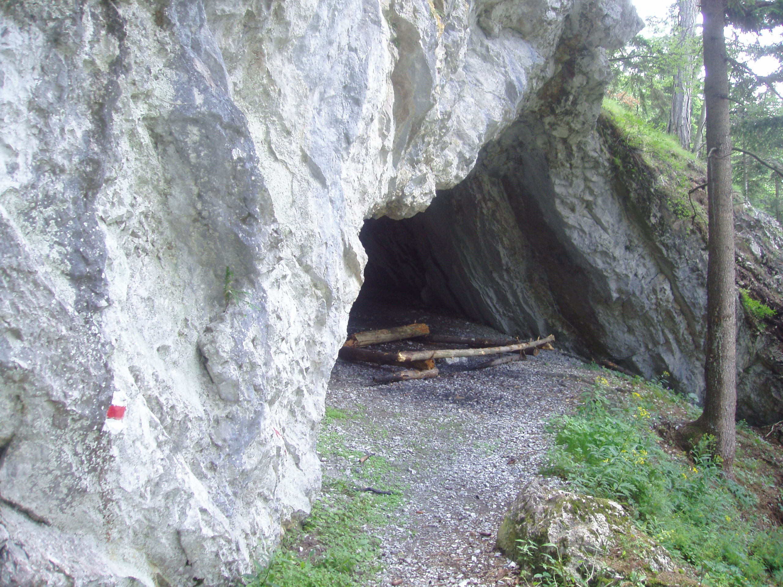 Die Allelujahöhle am Himberg in der Marktgemeinde Puchberg am Schneeberg im südlichen Niederösterreich.